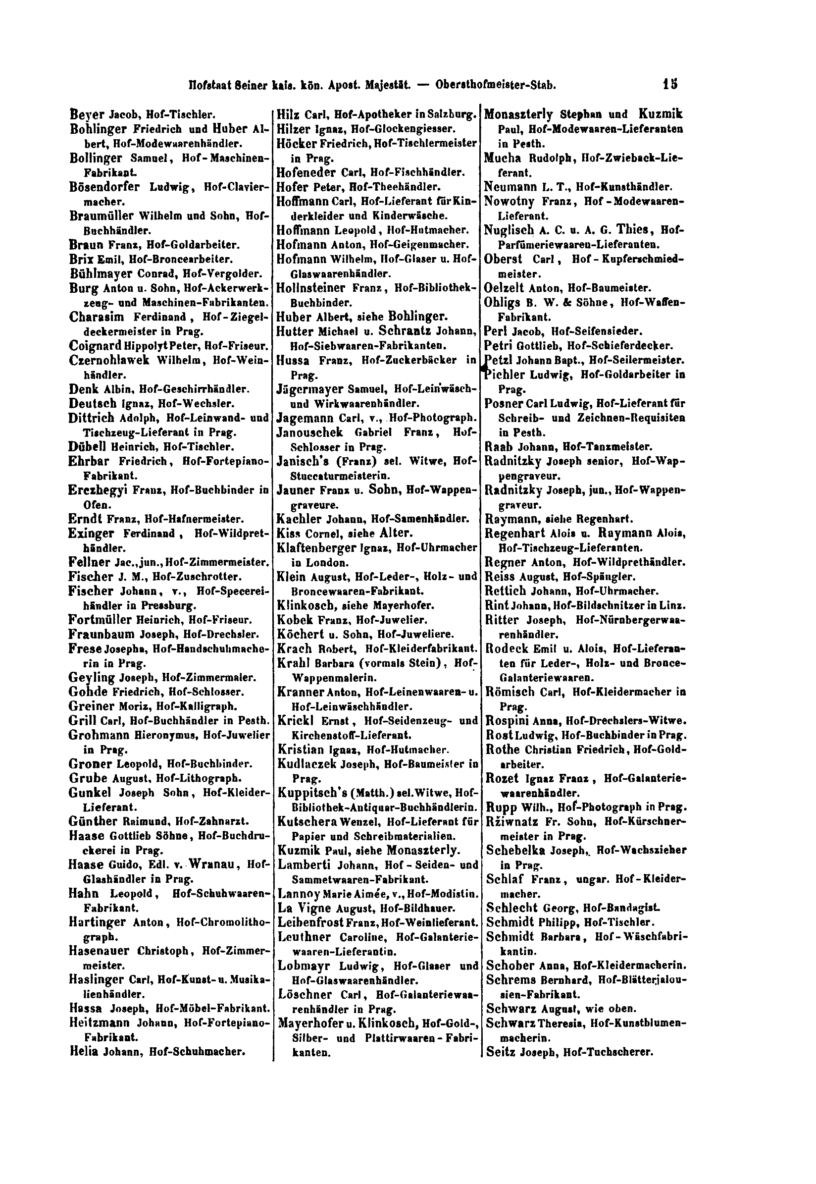 Hof- und Staats-Handbuch des Kaiserthumes Österreich für das Jahr 1868, Seite 15.